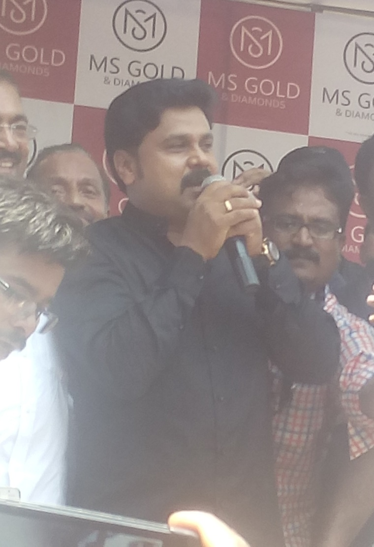 കണ്ണൂർ ജില്ലയിലെ മലയോര മേഖലയുടെ സിരാ കേന്ദ്രമായ ഇരിട്ടിയിൽ ഒരു ജ്വല്ലറിയുടെ ഉദ്ഘാടനത്തിന് വന്നപ്പോൾ